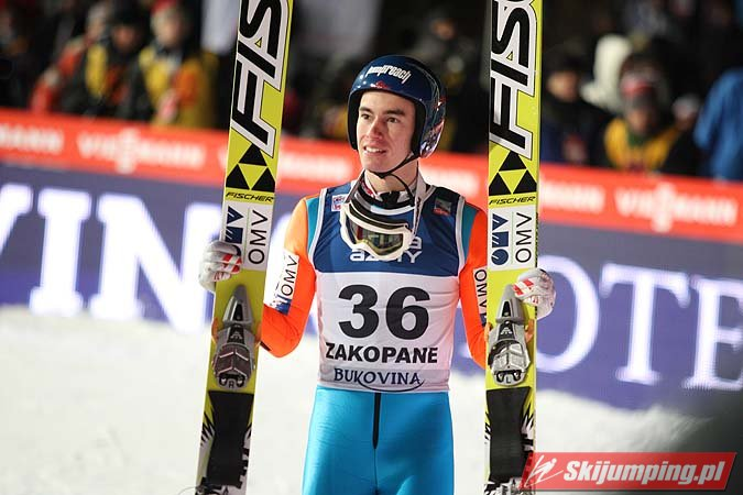 Puchar Świata w Zakopanem 2012/2013 – konkurs indywidualny (12 stycznia 2013)